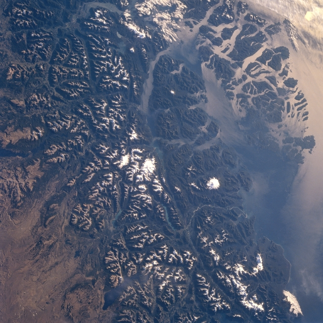 Foto satelital del Archipiélago de los Chonos, Chile.